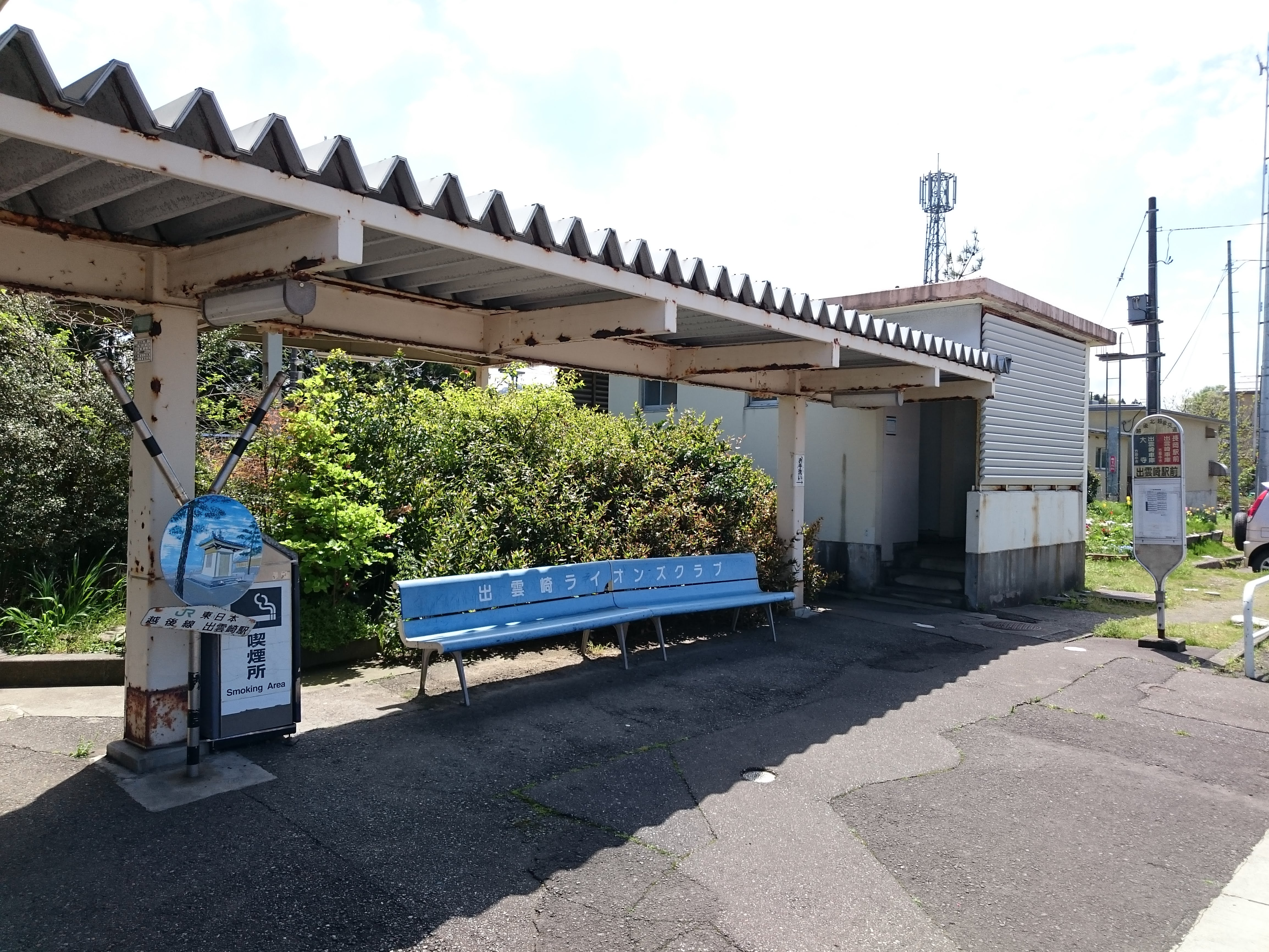 出雲崎駅の待合椅子と化粧室